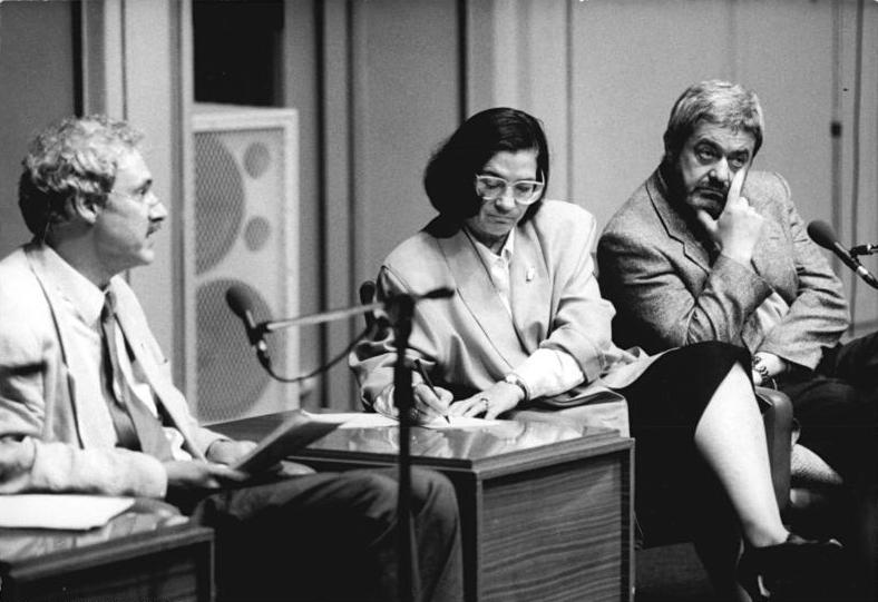 ADN-Grimm 10.6.1990 Berlin: Diskussion "40 Jahre deutsch-deutsche Literatur - Versuch einer Bilanz" war der Titel einer Diskussionsveranstaltung in der Akademie der Künste der DDR, die in Zusammenarbeit mit der Westberliner Akademie der Künste organisiert wurde. An der Diskussion nahmen deutsche Schriftsteller und Dichter teil. Hier Gesprächsleiter Wolfgang Emmerich (l.), mit Christa Wolf (m.) und Jurek Becker (r.).